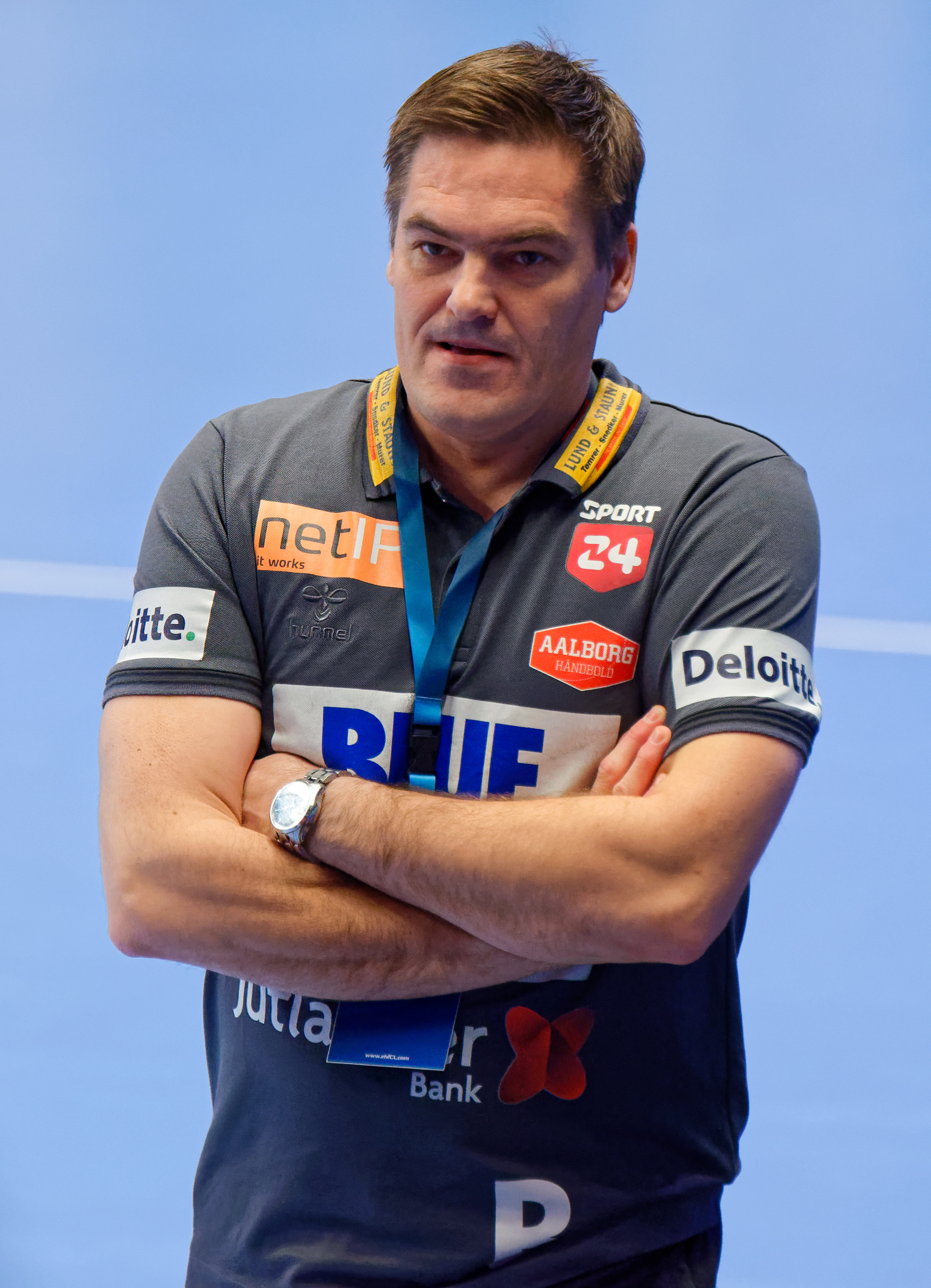 Rencontre de phase de groupe de la ligue des champions 2017/18 entre le PSG et Aalborg. A Coubertin, le 2 décembre 2017.